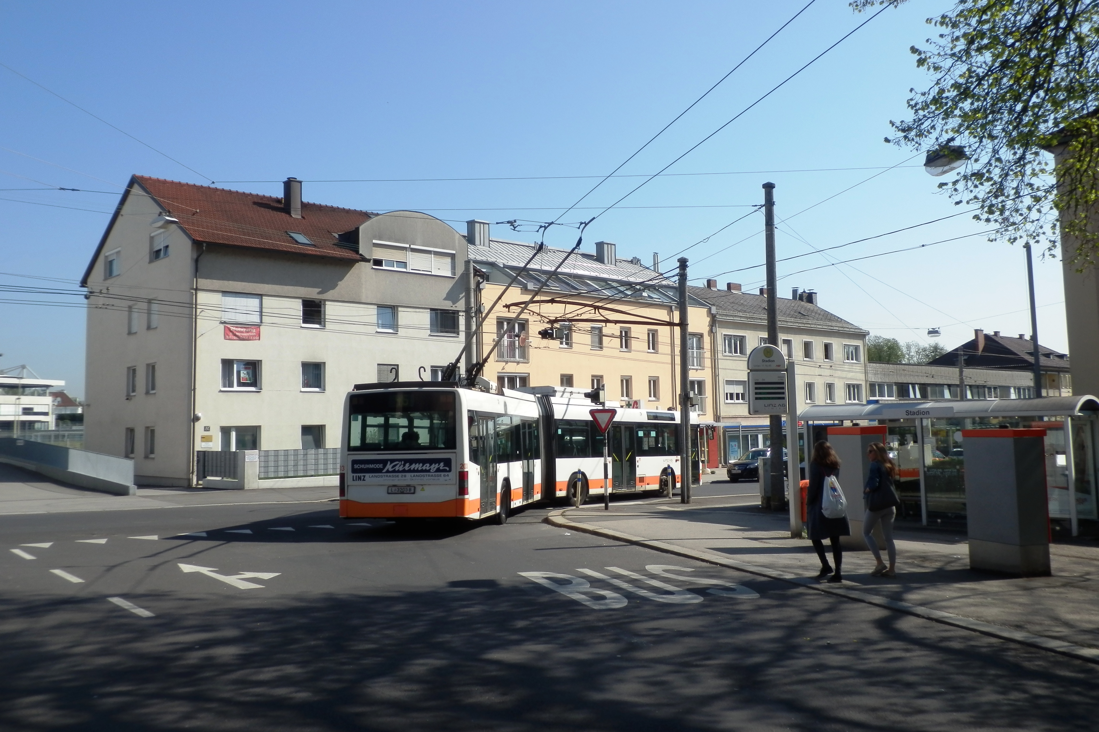 Linz AG Obus - Linie 46 bei der Haltestelle Stadion